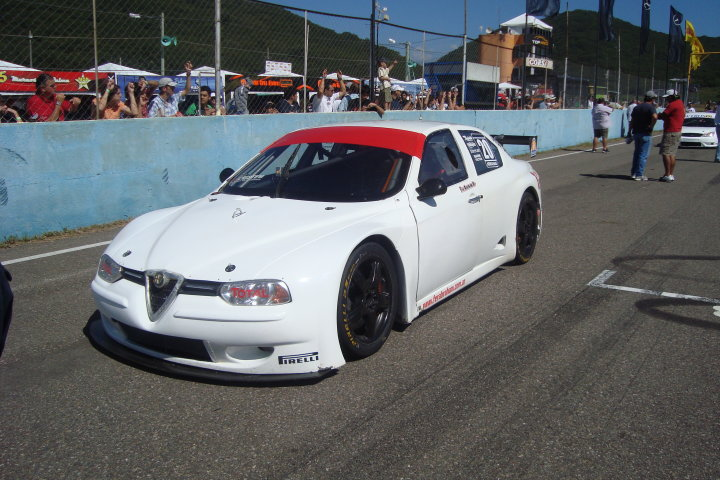 Alfa Romeo 156 de Top Race Series. Piloto: Fernando Abraham